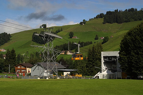 Talstation der Kronbergbahn (Jakobsbad)